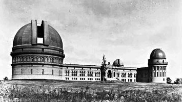 Yerkes Observatory